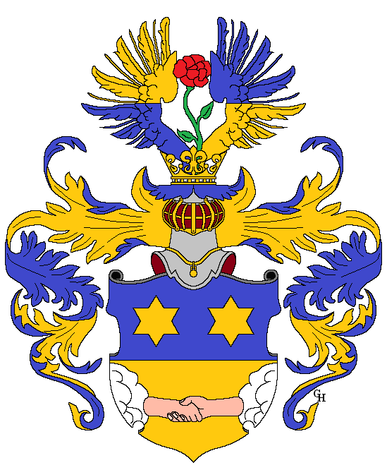 Wappen des böhmisch-österreichischen Großindustriellen (Likörfabriksbesitzer) Juda Leopold Porges (1785–1869), verliehen anlässlich seiner Erhebung in den österreichischen Adelsstand als "Edler von Portheim" am 5. Juni 1841. (Am selben Tag wie Juda Leopold Porges erhielt sein Bruder Moses Gabriel Porges (1781–1870) ebenfalls den österreichischen Adelsstand als "Edler von Portheim", allerdings führte dieser anstatt der Rose einen wachsenden Hirschen im Wappen.) Zeichnung von Gerd Hruška ( Für weitere Informationen zu dieser Standeserhebung siehe (